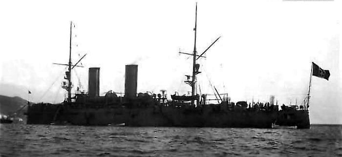 La RN Puglia all'ormeggio con la pitturazione coloniale